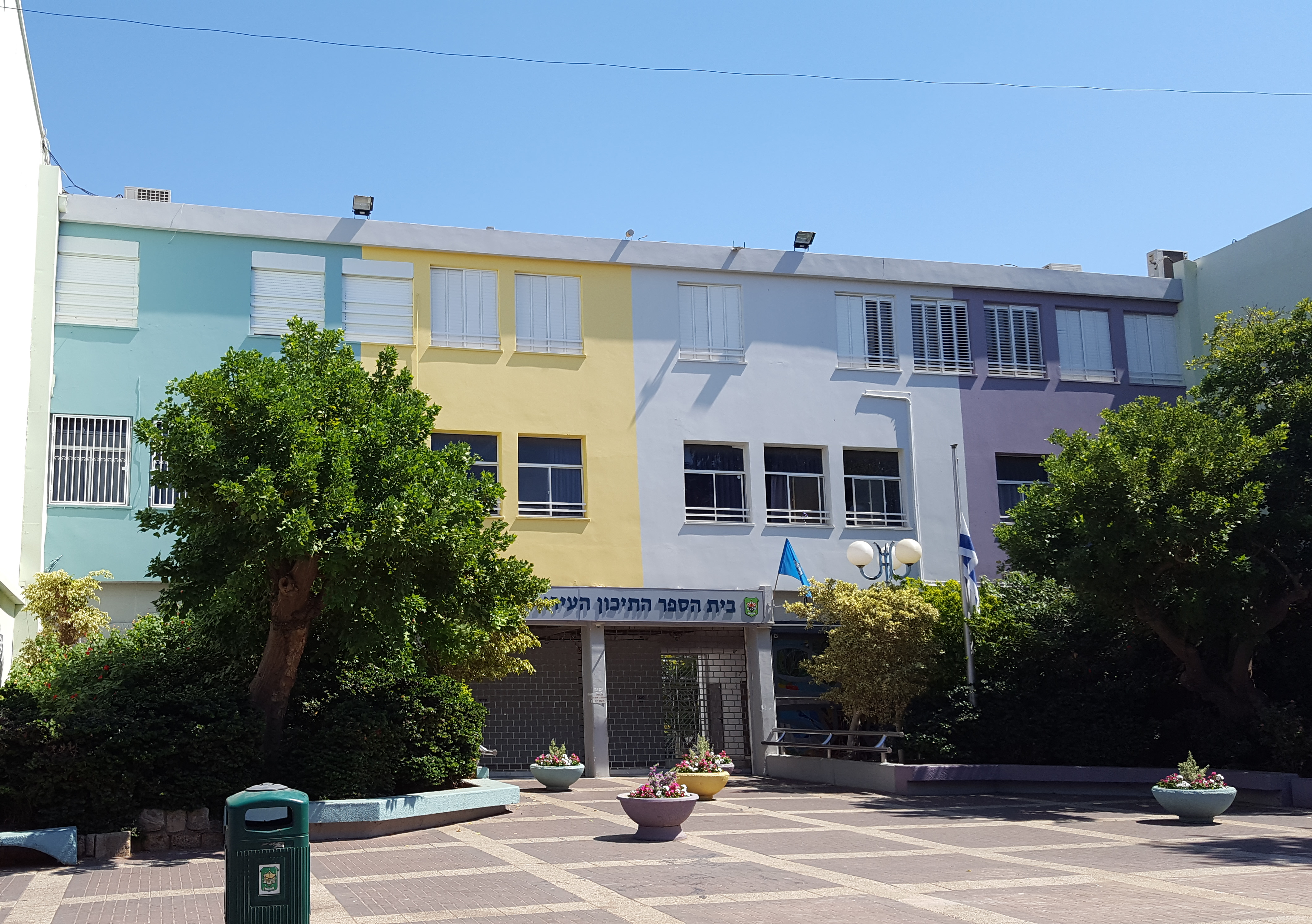 תיכון עירוני בליך ברמת חן, רמת גן, ישראל